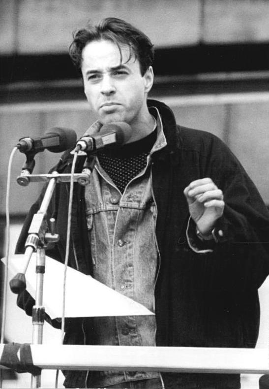 Berlin, Demonstration, Rede Jan-Josef Liefers ADN-ZB Link 4.11.89 Berlin: Demonstration 500.000 Bürger beteiligten sich an einer Demonstration für den Inhalt der Artikel 27 und 28 der Verfassung der DDR. Auf dem anschließenden Meeting auf dem Alexanderplatz ergriff auch der Schauspieler Jan-Josef Liefers vom Deutschen Theater das Wort.